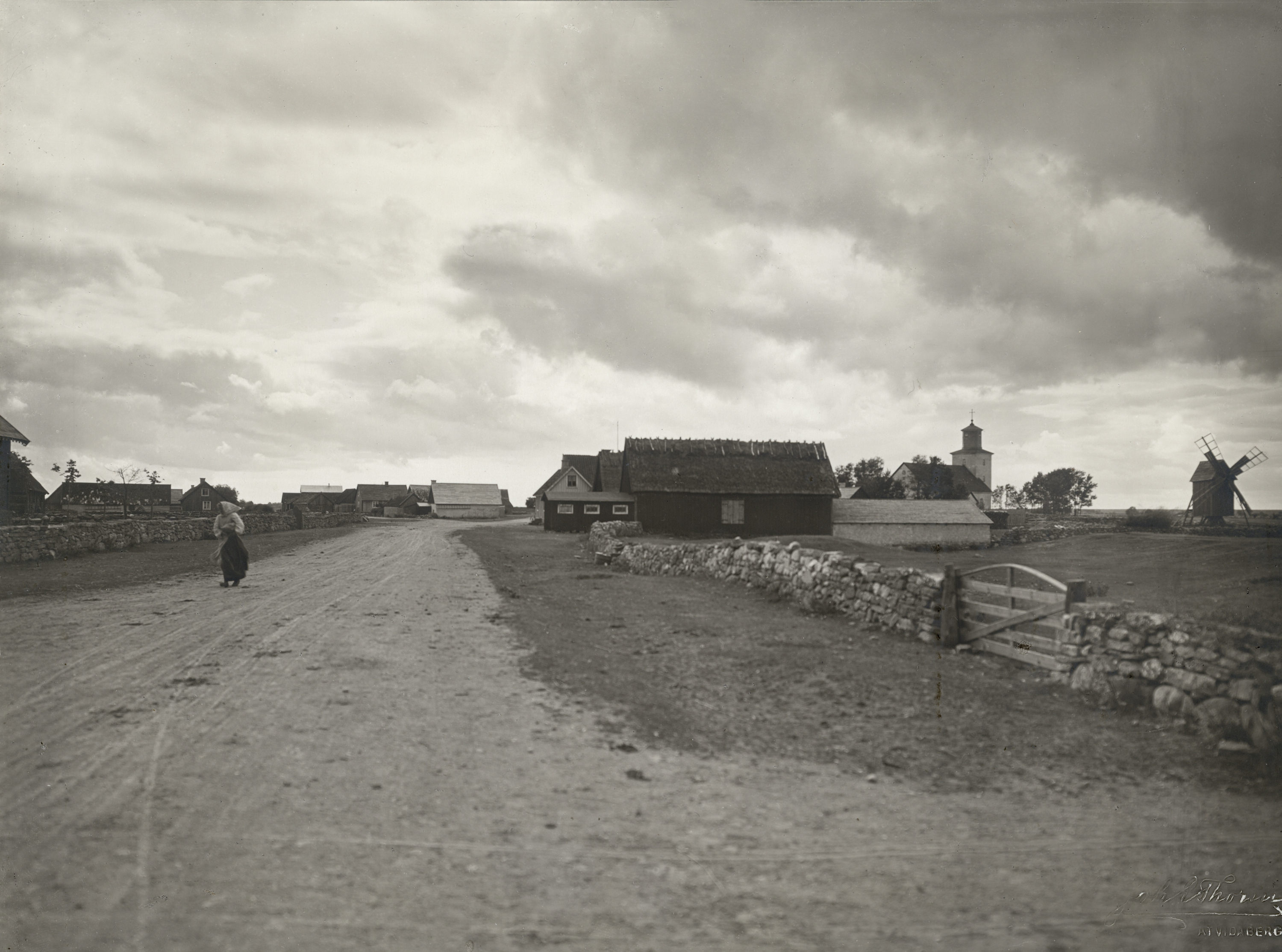 Öland, Möckleby härad, Gårdby socken, Gårdby.